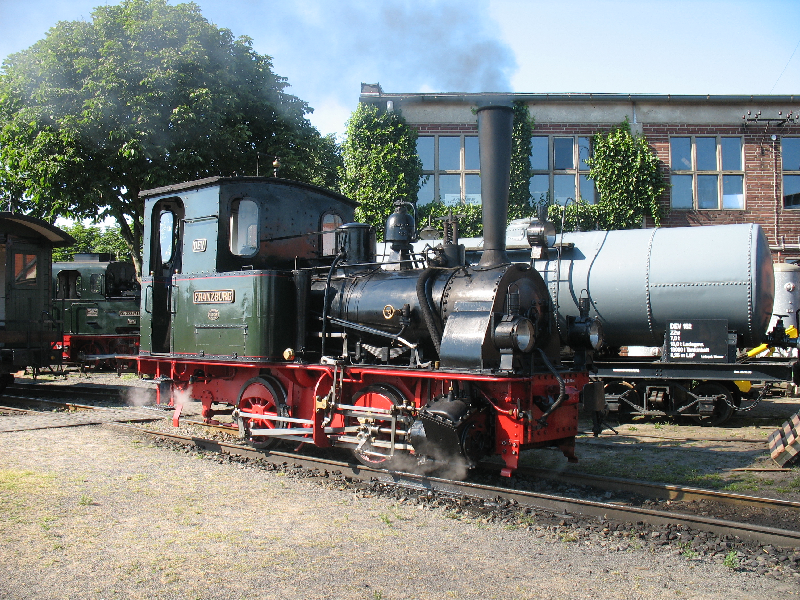 Lok Franzburg (ex DR 99 5605) des DEV (Deutscher Eisenbahn Verein) vorm Kohlebansen.